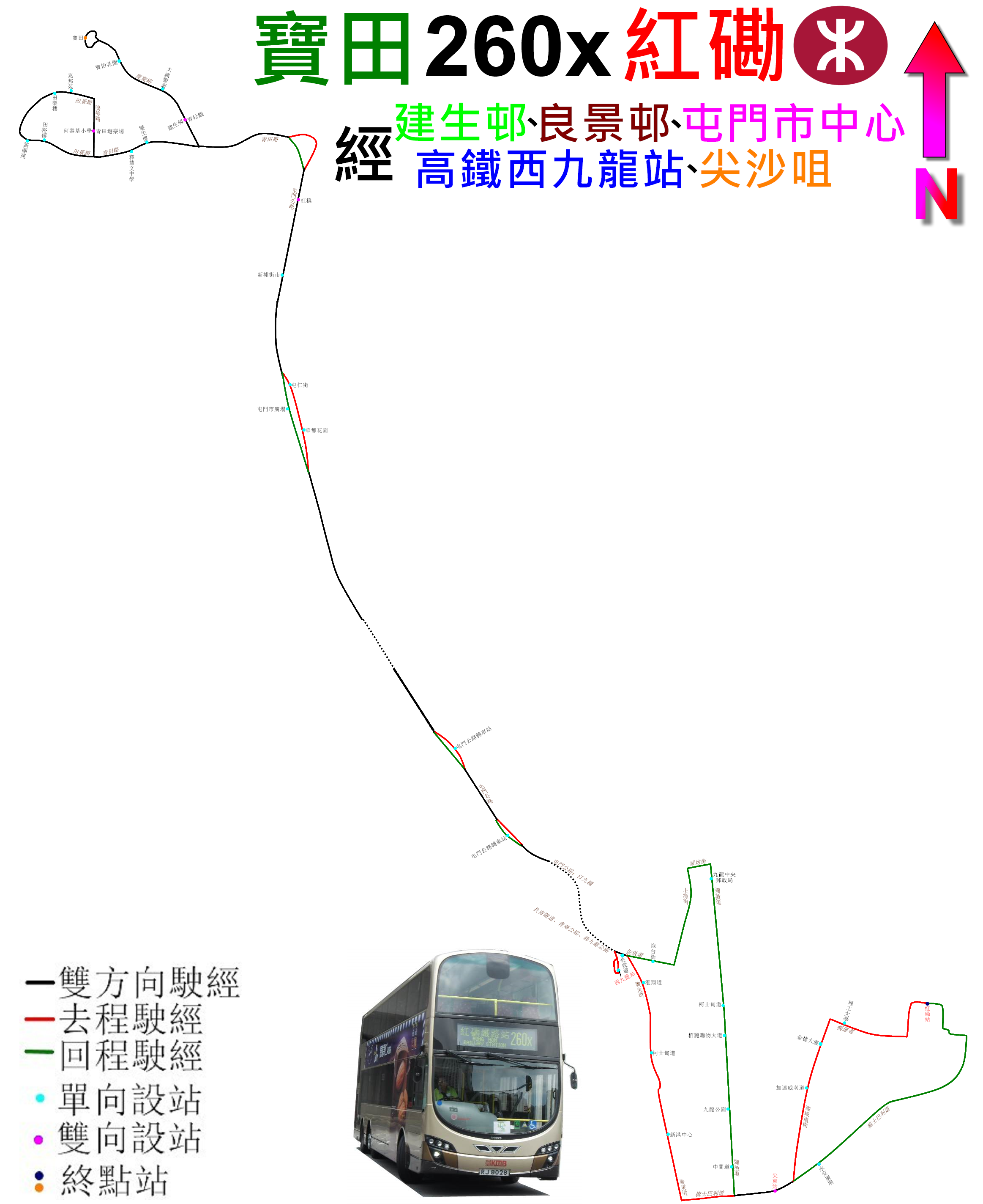 中文（香港）: 九巴260X線的走線圖